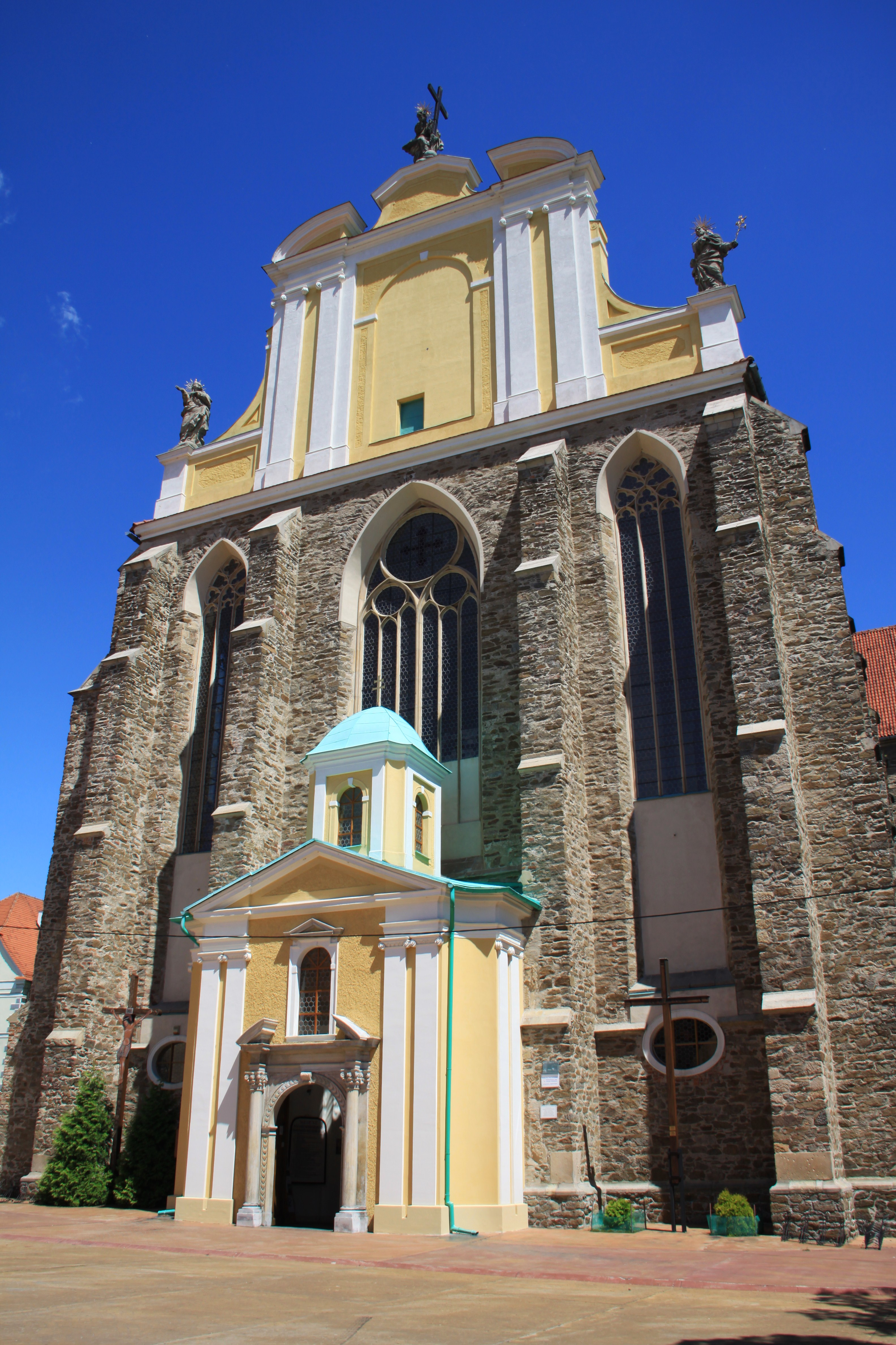 Kamieniec Ząbkowicki, kościół, ob. par. p.w. Wniebowzięcia NMP, 1325-1350, 1700